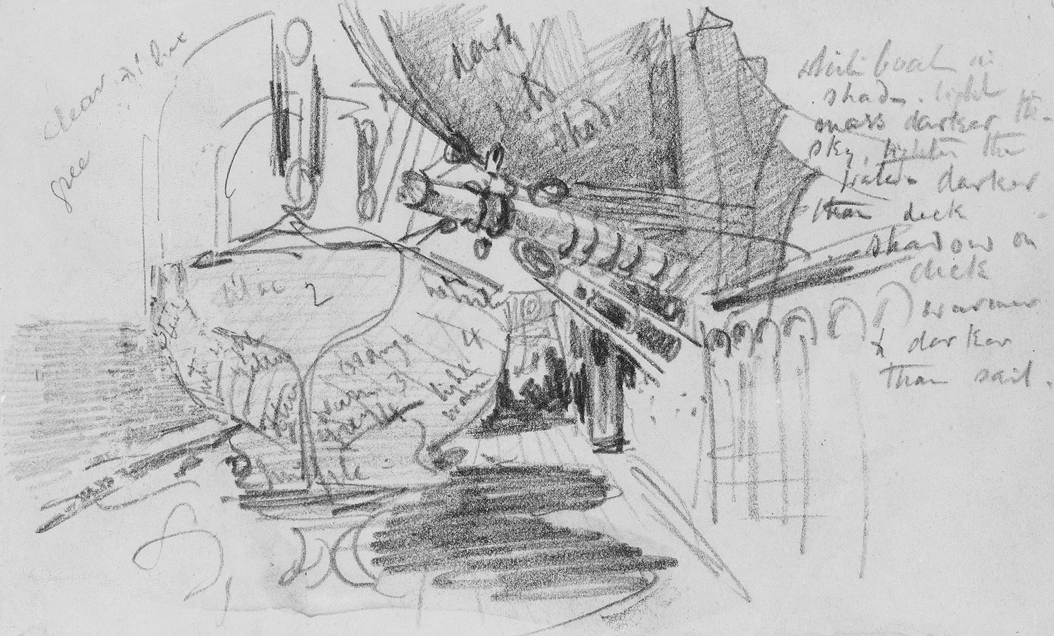 Drawing; Drawings